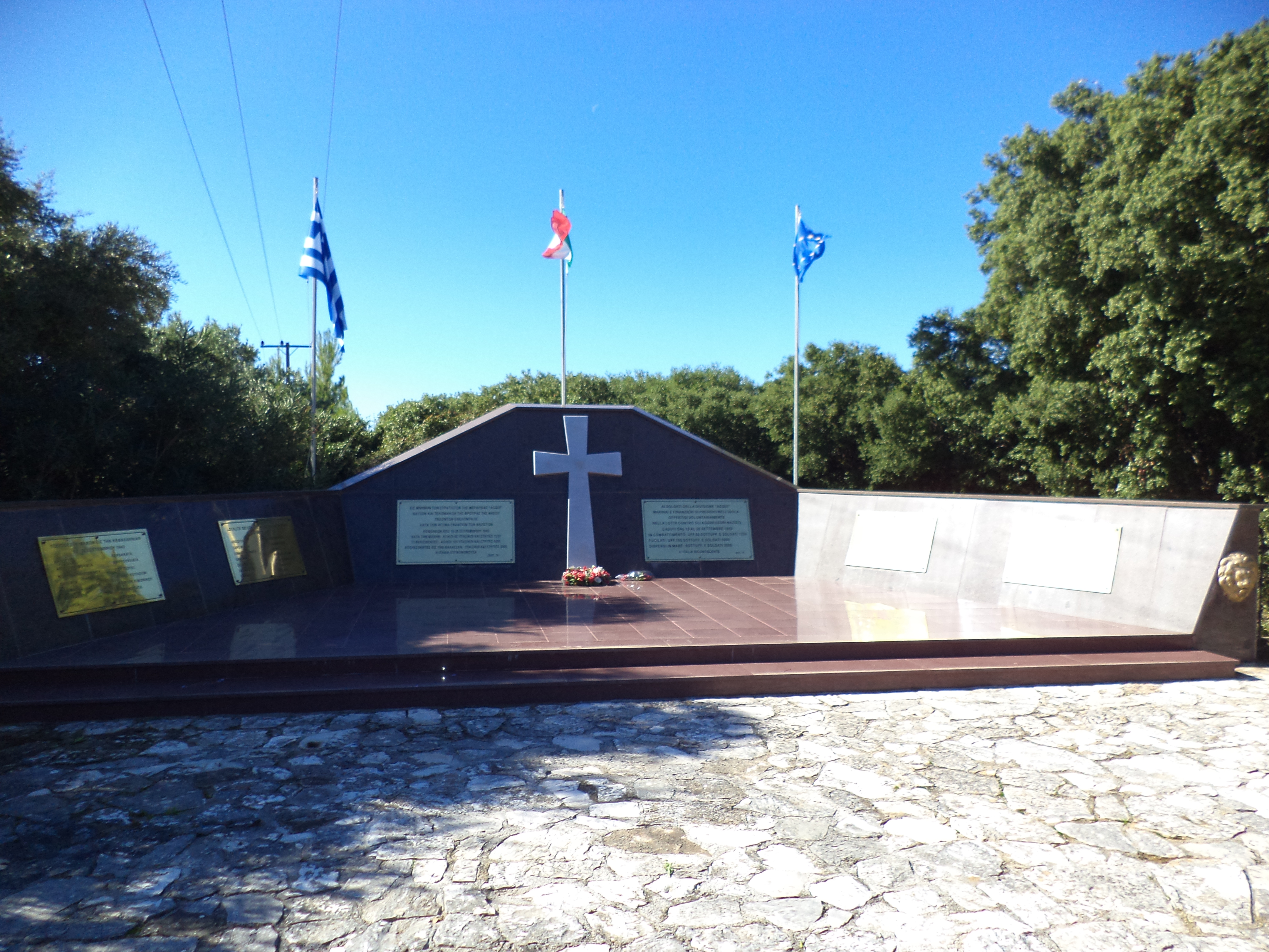 Memorial Acqui Division - Italian War Memorial Argostoli